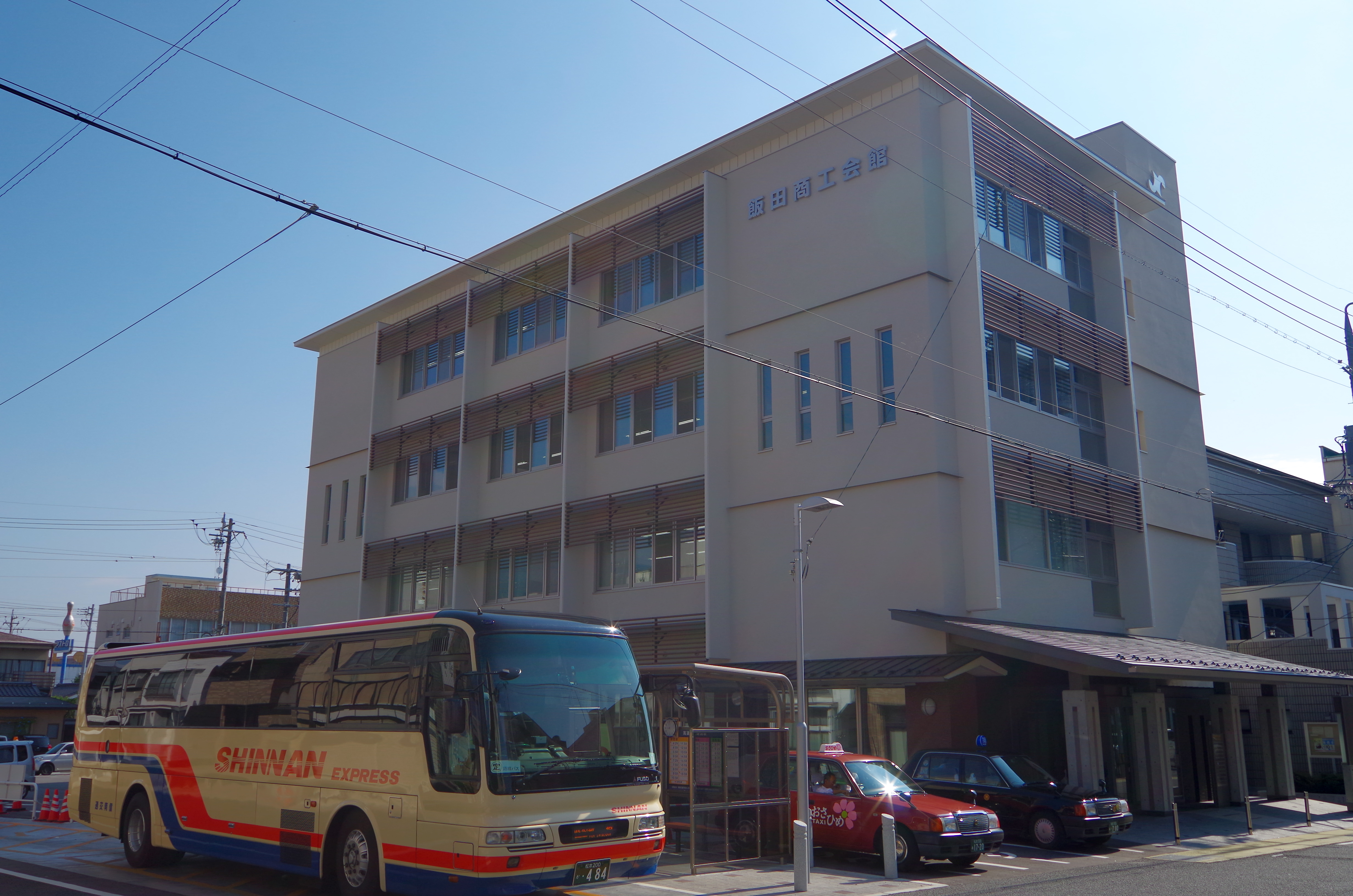 飯田商工会館 2014.9.10